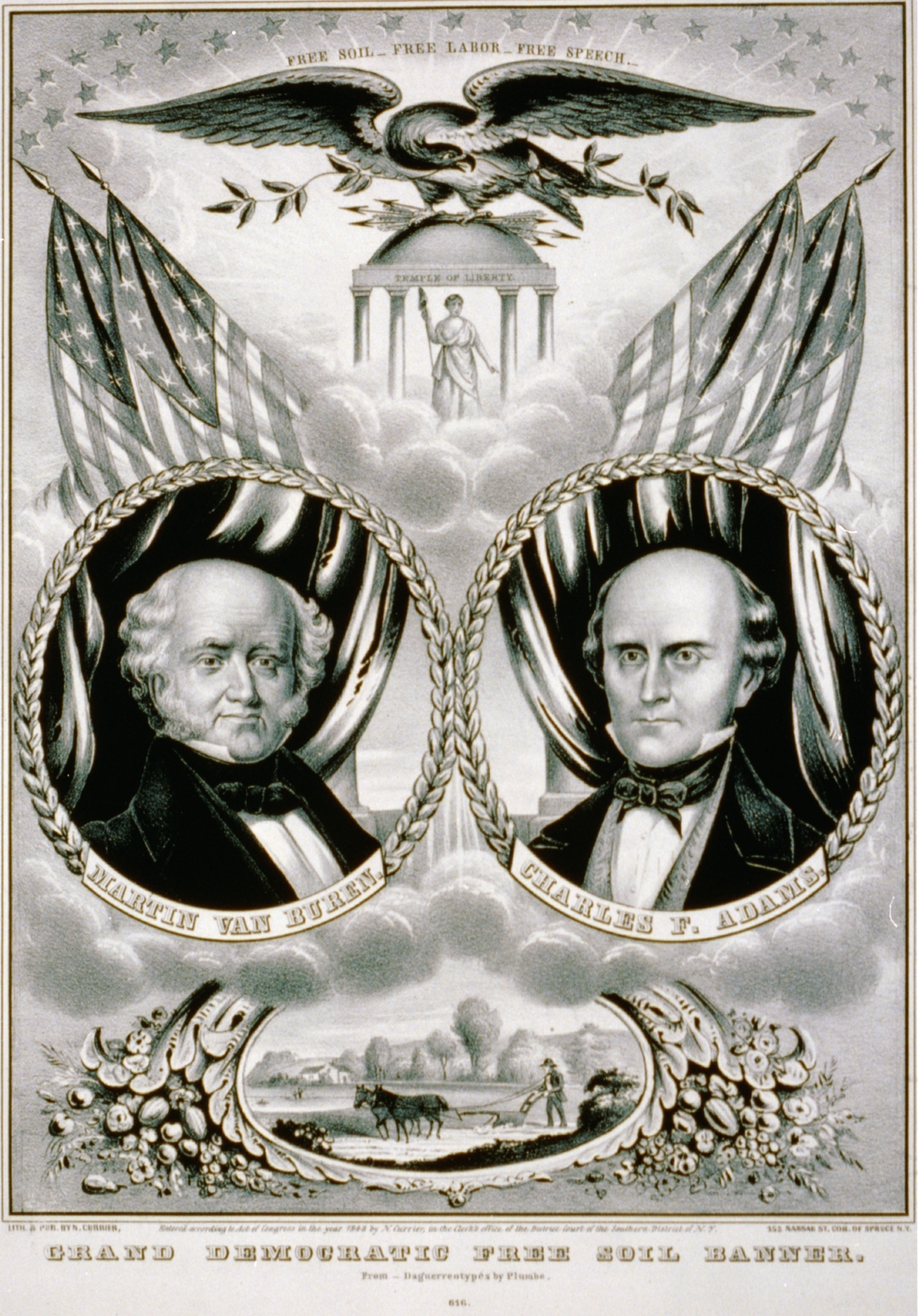 Plakat der Free Soil Party mit Martin Van Buren & Charles F. Adams Grand Democratic Free Soil banner. (Martin Van Buren & Charles F. Adams). Lithograph by N. Currier, 1848. Digital ID: cph 3b50339 Source: color film copy slide Reproduction Number: LC-USZC2-2465 (color film copy slide) , LC-USZ62-5124 (b&w film copy neg.) Repository: Library of Congress Prints and Photographs Division Washington, D.C. 20540 USA